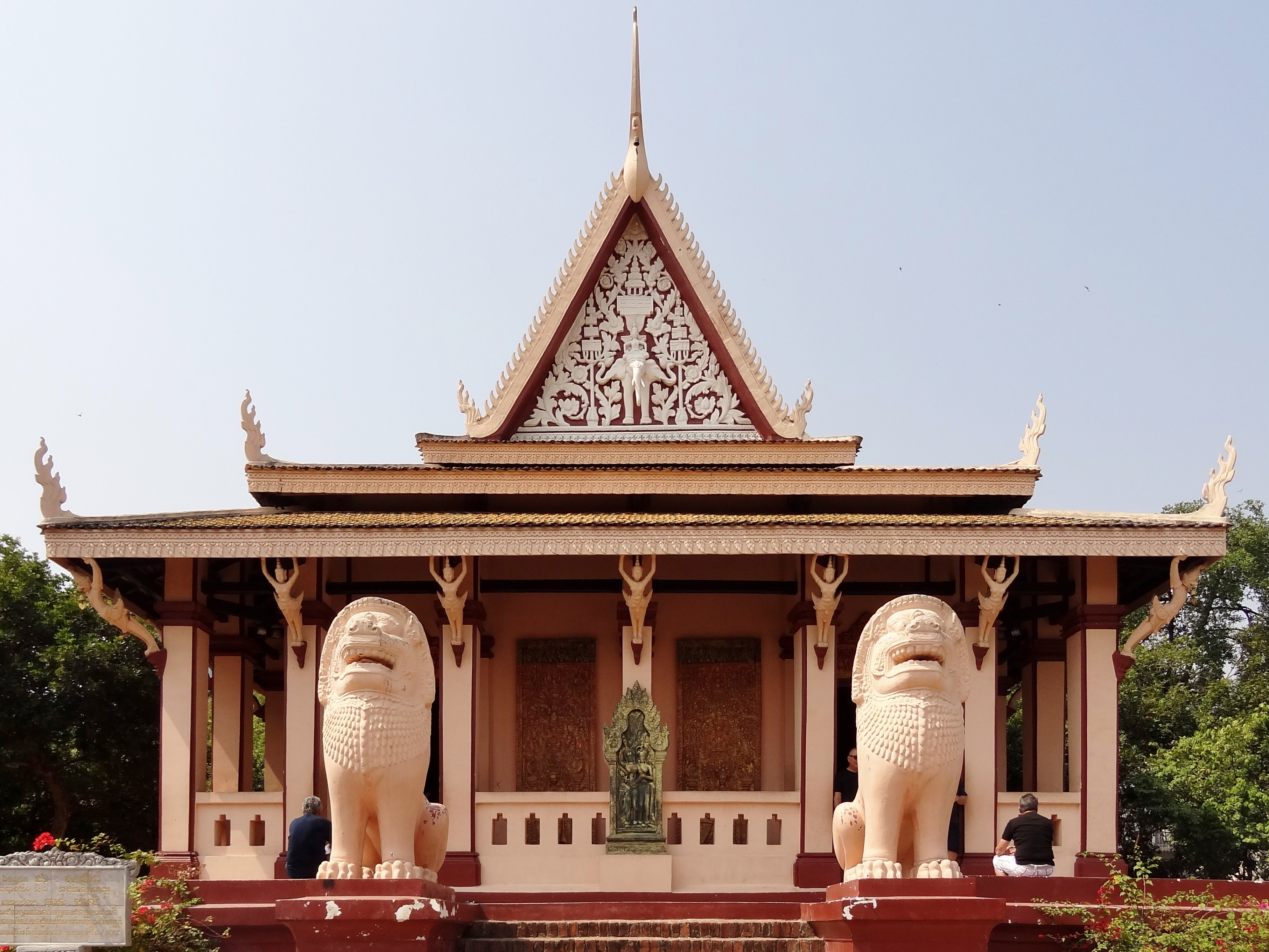 Wat Phnom Daun Penh in Phnom Penh, Kambodscha